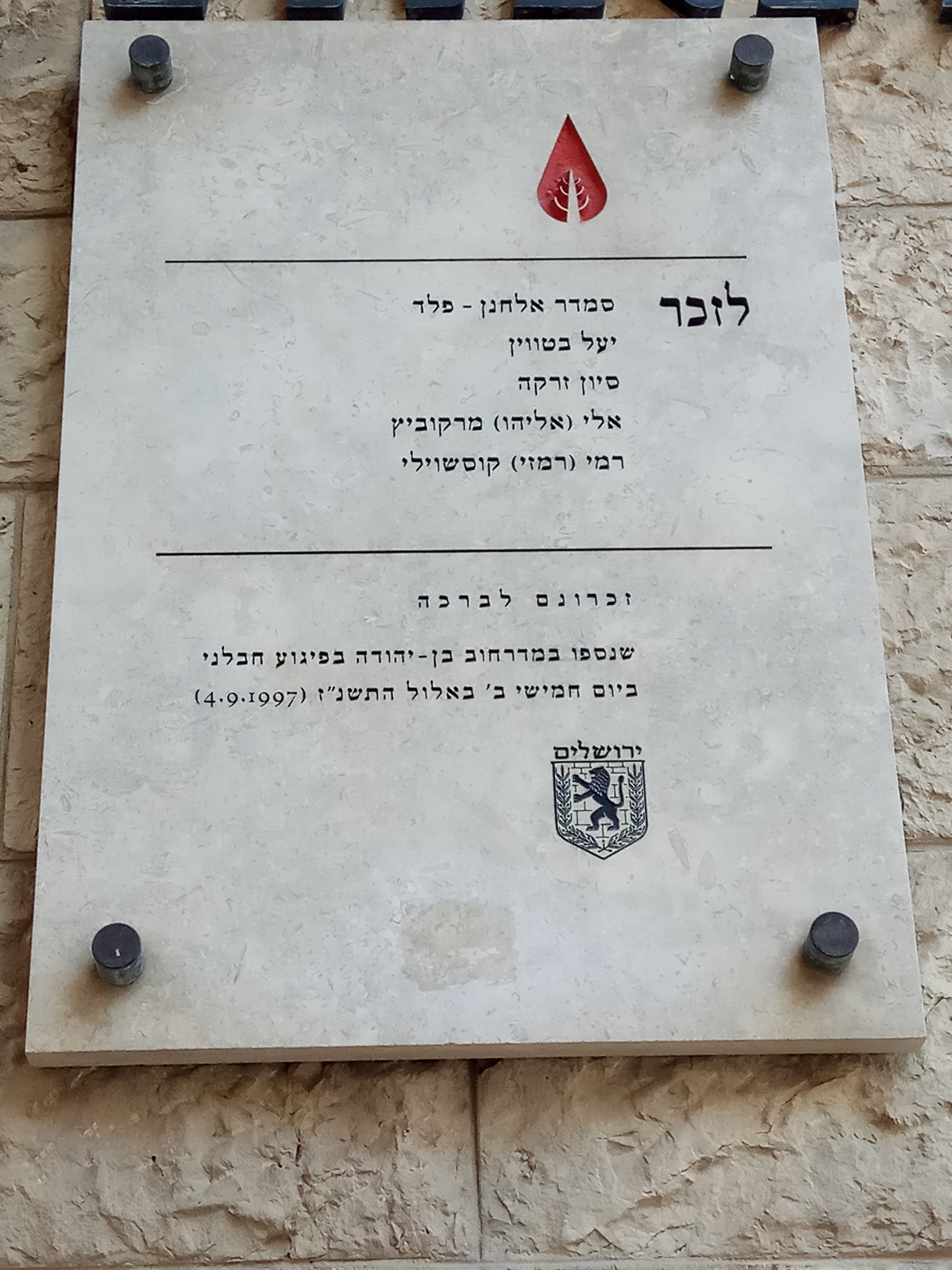 לוח זיכרון לנרצחי הפיגוע ברחוב בן יהודה ב-1997